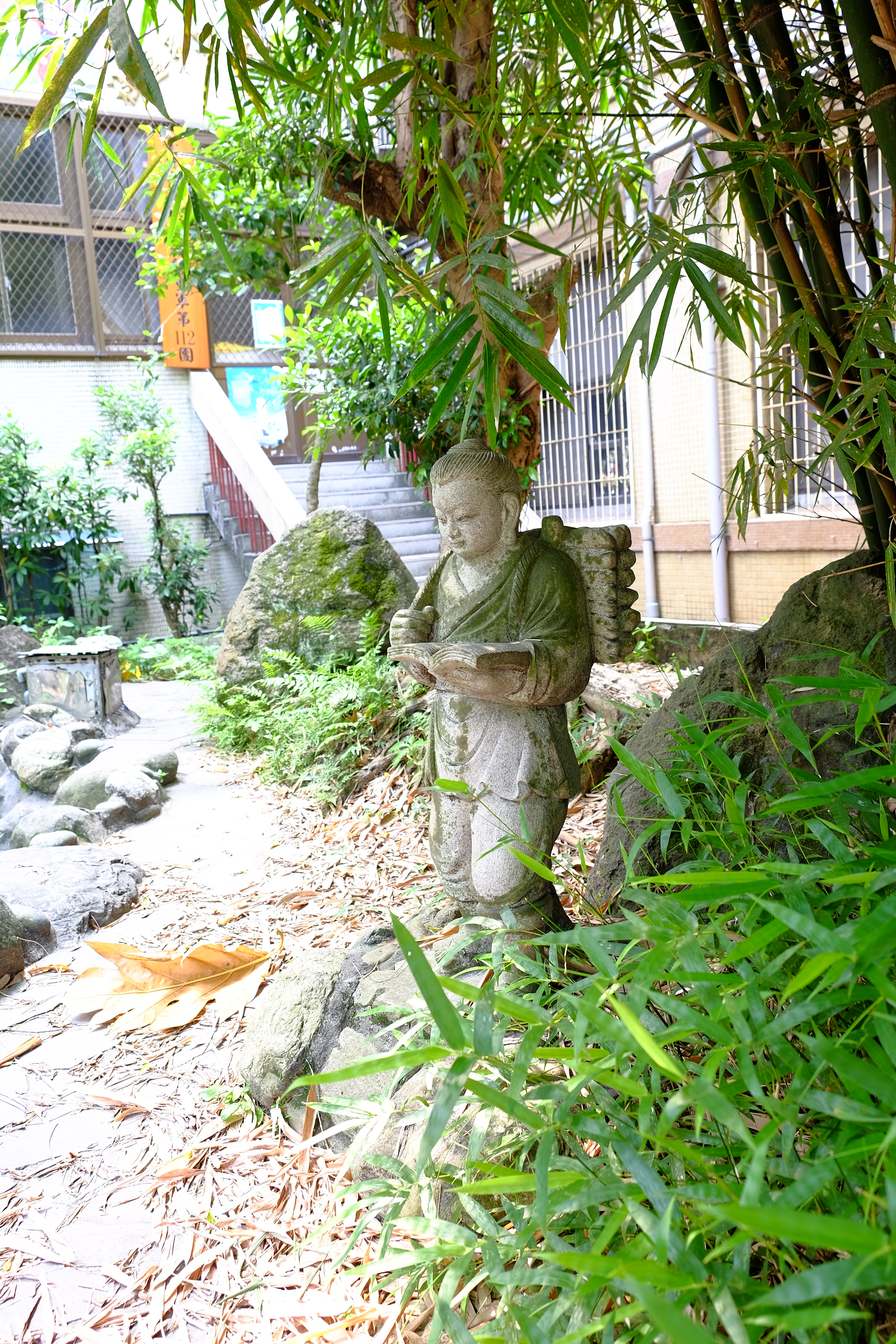 老松國小二宮尊德像 Taipei Municipal Lao-Song Elementary School